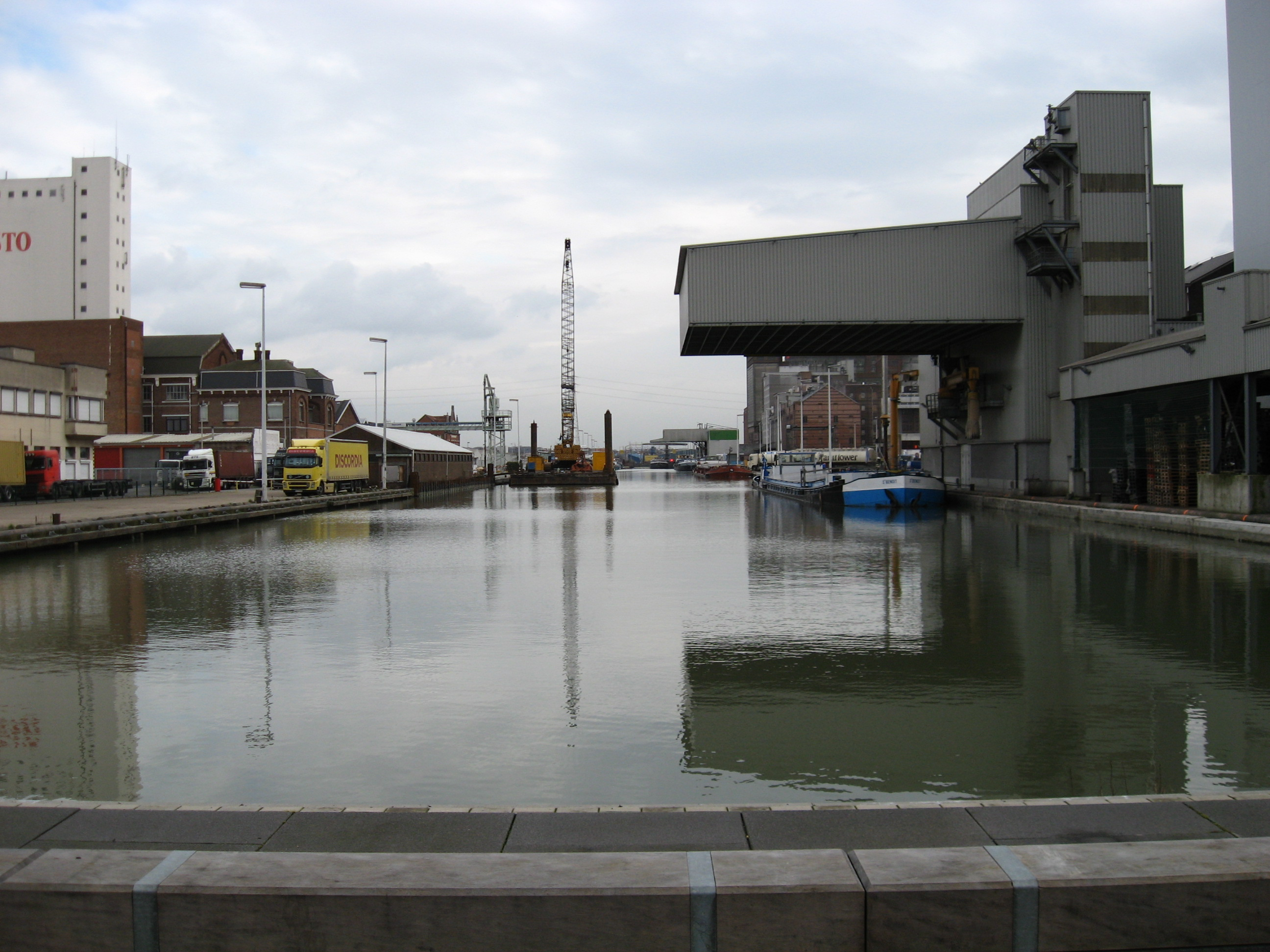 Binnenvaart "groot dok" in Merksem